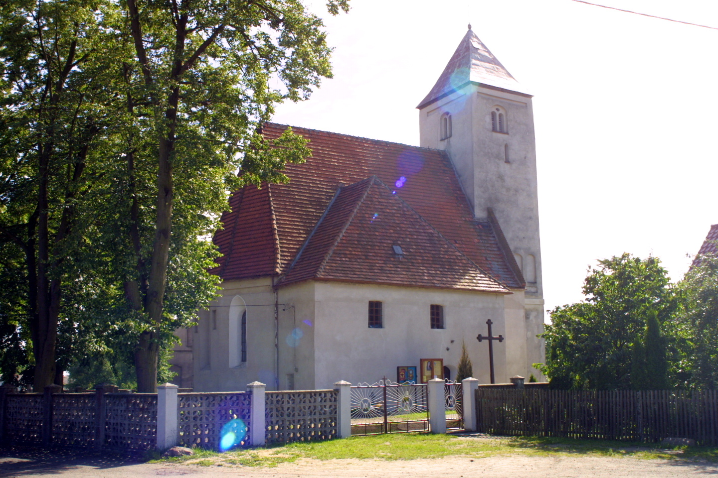 Sieroszowice. Kościół pw. śś. Piotra i Pawła z XVI w.